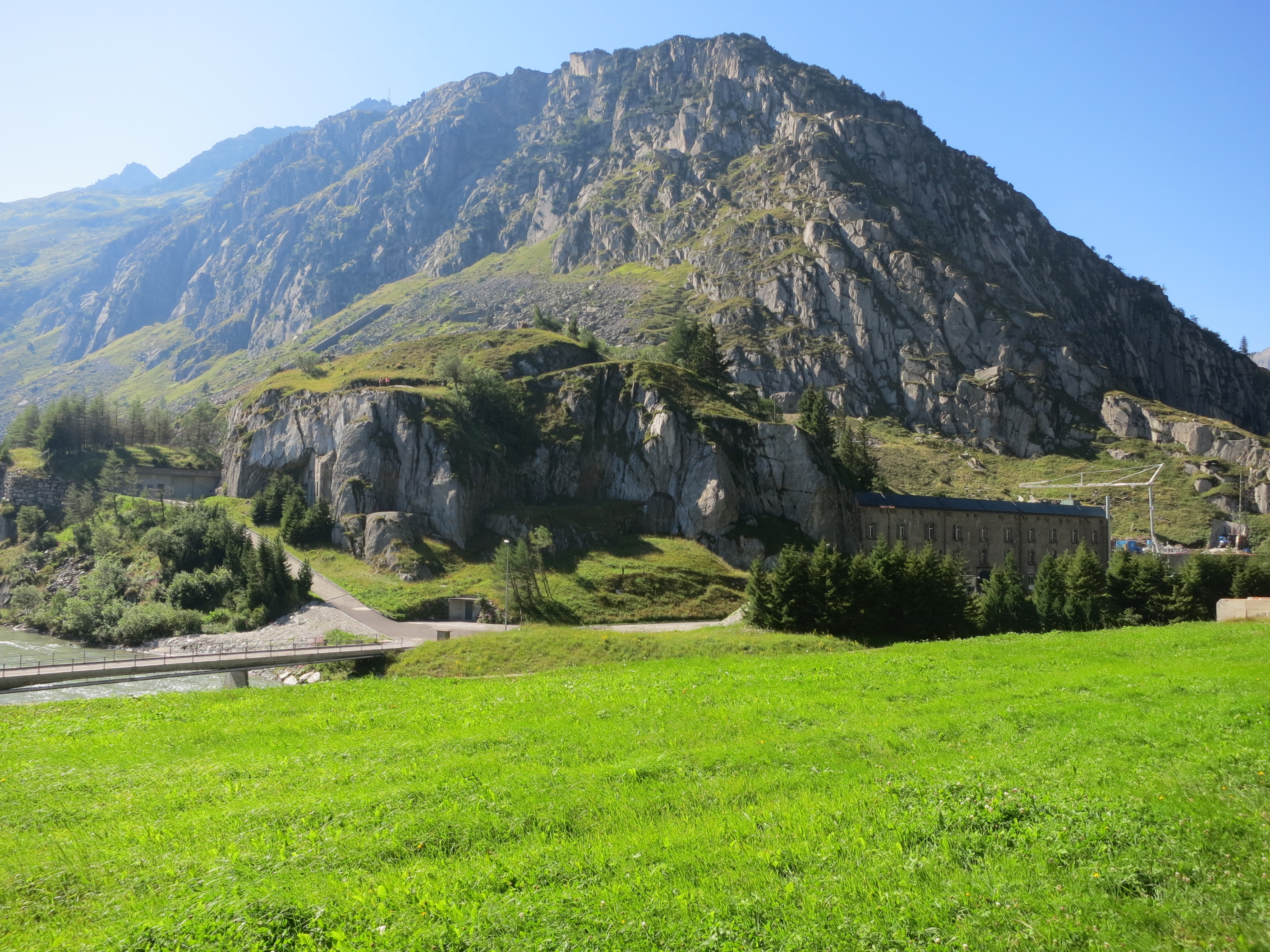 Fort Bühl, Andermatt UR, Schweiz